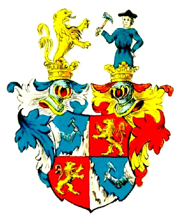 Wappen der „Ritter Haymerle.“ (einer alten deutsch-böhmischen Familie); Freiherrenwappen 1876 für Heinrich Karl Ritter von Haymerle, k. u. k. Gesandten.